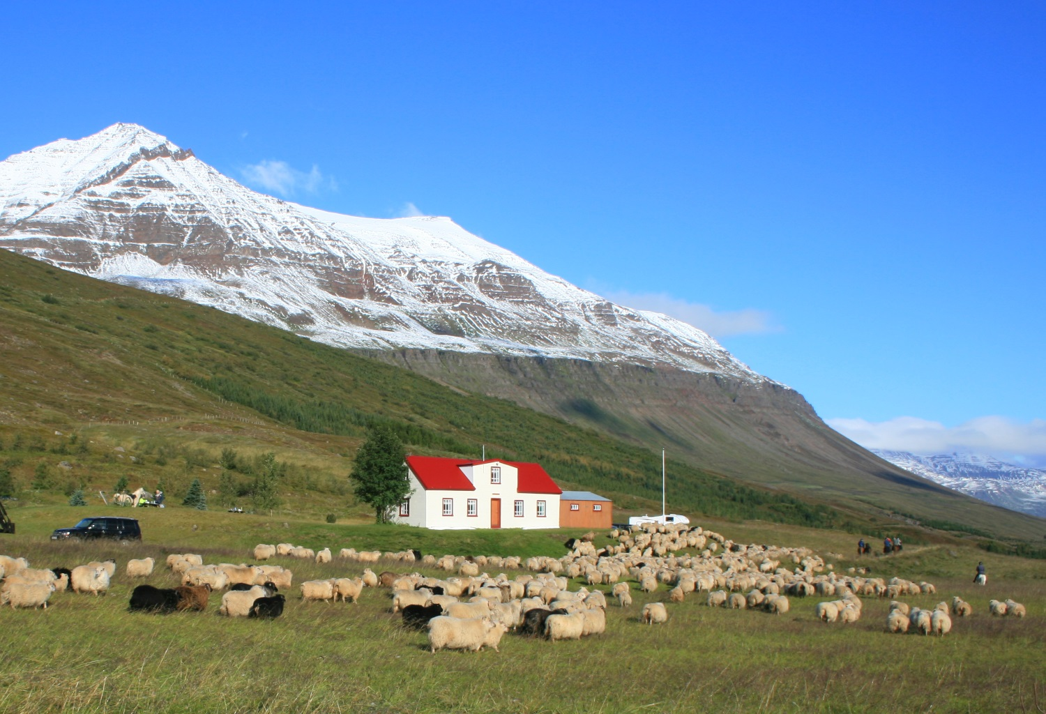 Kóngsstaðir í Skíðadal